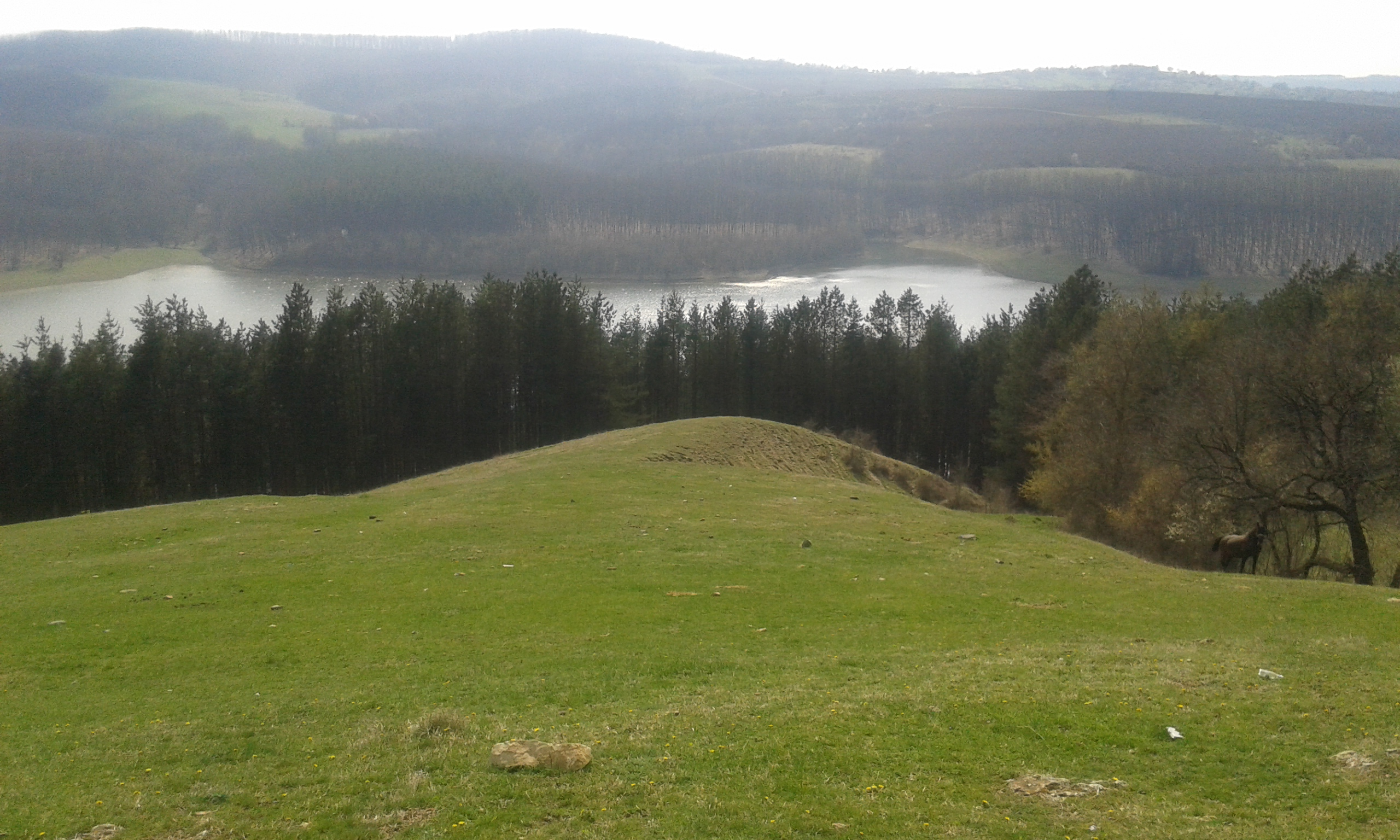 Местността „Гюня“